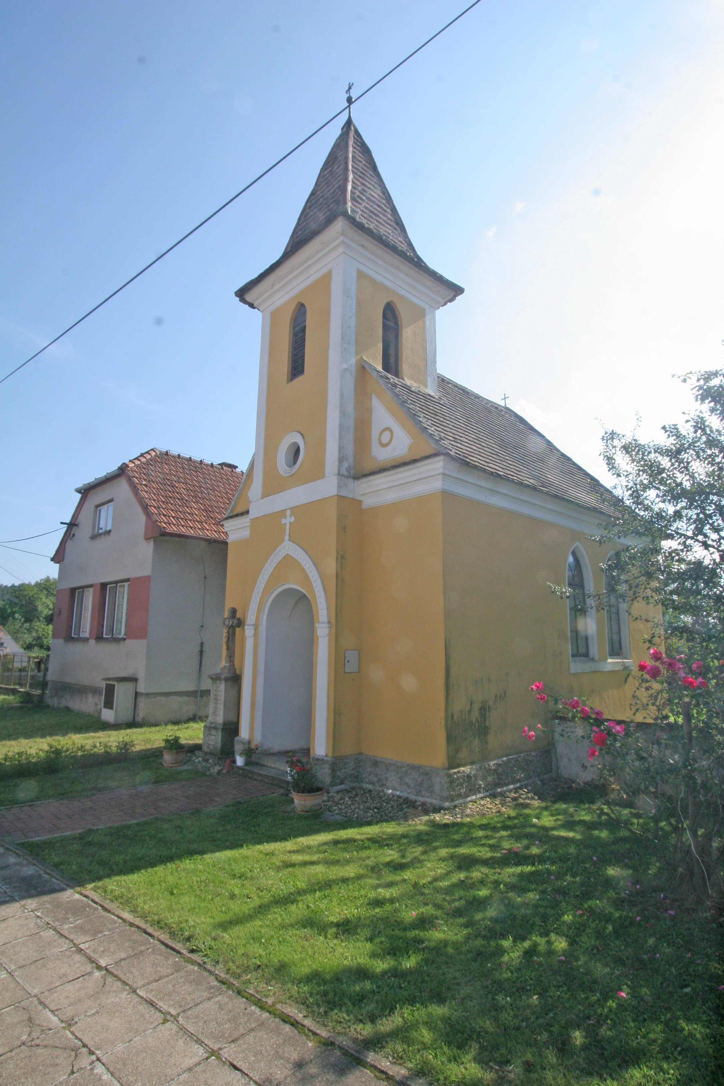 Zblovice kaple